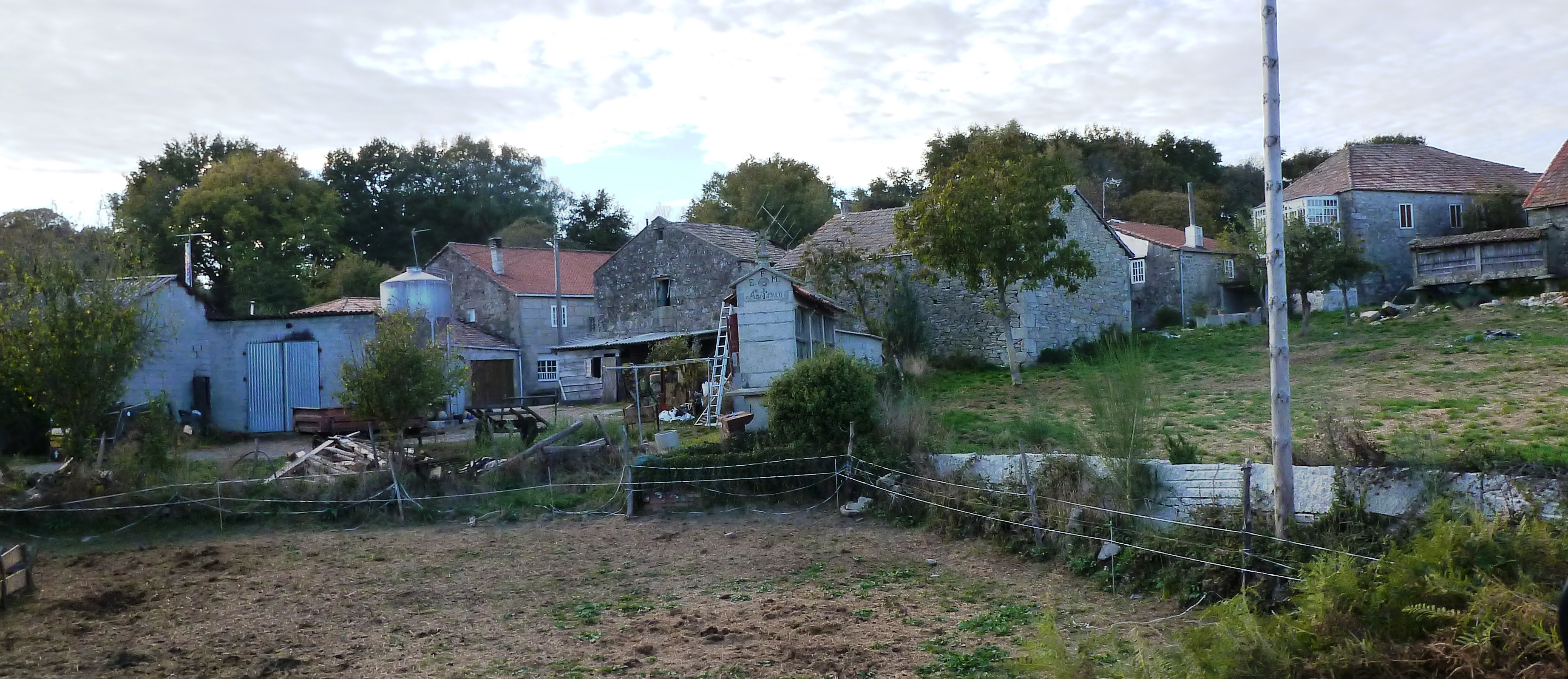 Sever, Aguada, Carballedo